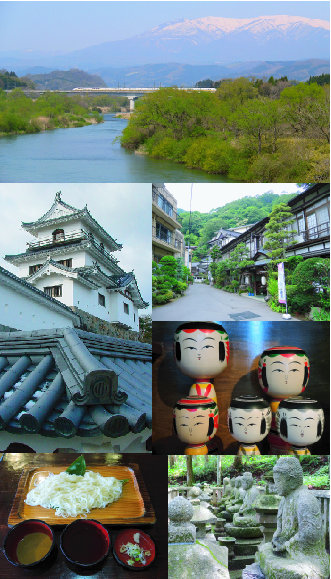 白石市のイメージ画像2